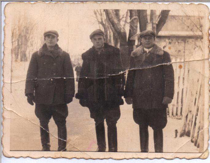 Початок 30-тих ХХст.По середині А.Вашкевич.Такі кожухи шили в Черничині.